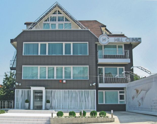 Хил Клиник е специализирана в Дерматология, Ендокринология и Диетология, Акушерство и Гинекология, Женска и Мъжка Урология, УНГ, Лаборатория. Намира се в град София, кв. „Бояна”, в близост до резиденцията. В нея се прилагат иновативни за страната технологии и методи - зелен лазер при аденом на простата, лазерно разбиване на камъни в пикочните пътища, лазерни процедури за подобряване на сексуалните функции - LVR, DLV, слингови технологии при инконтиненция (изпускане на урина), лазери с приложение в естетичната дерматология, за които има натрупан дългогодишен клиничен опит в чужбина. Те са с доказан ефект и българските пациенти получават същото качество, но ценово съобразено със стандарта в страната. Специалистите на клиниката се обучават в най-добрите клиники в чужбина, посещават и всички значими форуми в ресора им. В Хил клиник гостуват чужди лекари като част от международното сътрудничество на здравното заведение с водещи специалисти. Клиниката работи от юли 2009 г. и има голям брой успешни интервенции и доволни пациенти. Методите за лечение са иновативни и минимално инвазивни. Болничният престой е еднодневен и пациентите се радват на максимален комфорт и грижа. Служителите на Хил Клиник вярват, че здравеопазването може да се случва така – с усилия за превенция, компетентно, с цялото уважение и грижа към пациента.